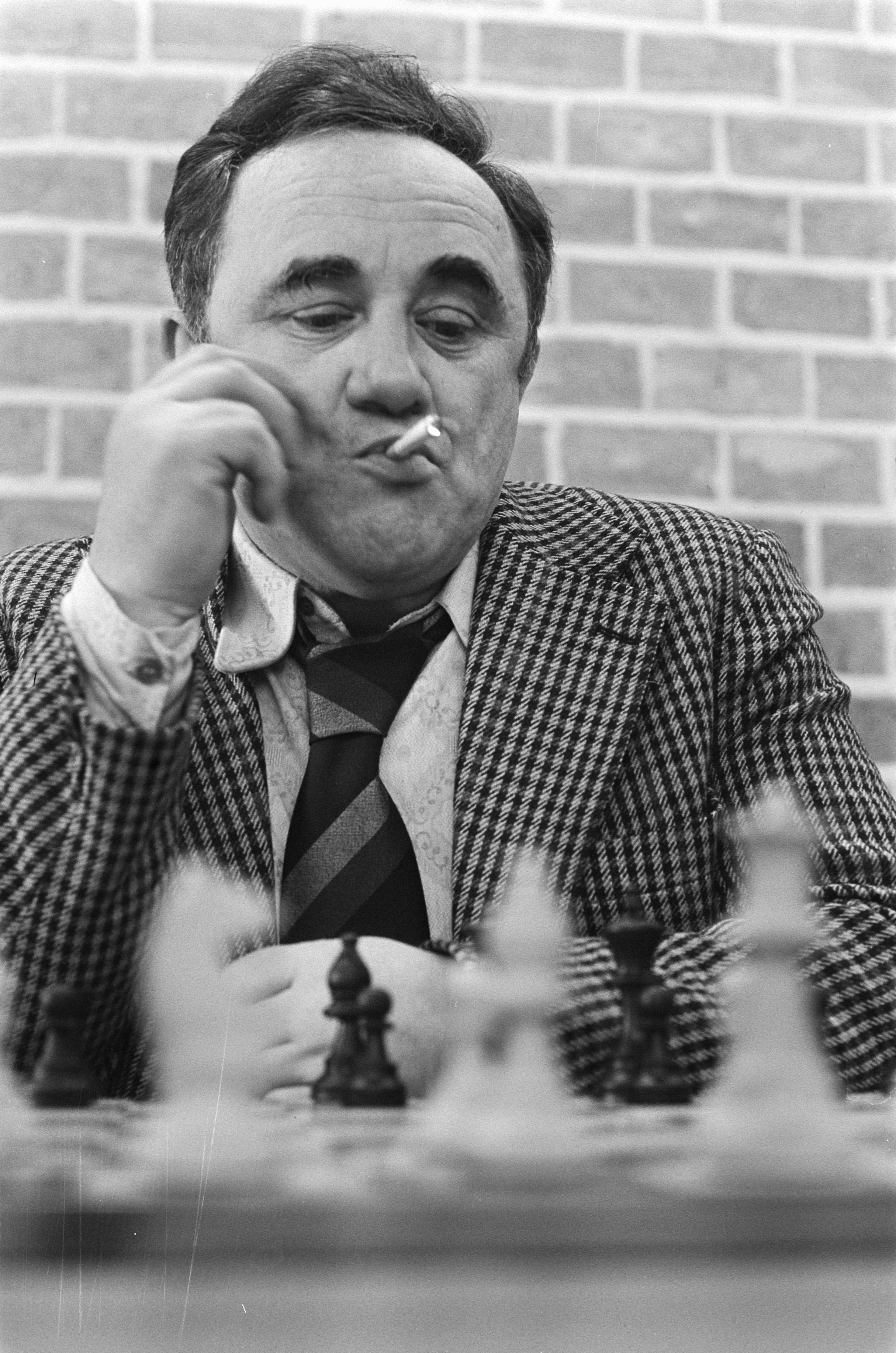 Collectie / Archief : Fotocollectie Anefo Reportage / Serie : [ onbekend ] Beschrijving : Hoogovenschaaktoernooi Wijk aan Zee , 1e ronde; nr. 9, 1 Geller in actie, nr. 11, 12 Timman in actie Datum : 14 januari 1975 Locatie : Noord-Holland, Wijk aan Zee Trefwoorden : schaken Instellingsnaam : Hoogovenschaaktournooi Fotograaf : Verhoeff, Bert / Anefo Auteursrechthebbende : Nationaal Archief Materiaalsoort : Negatief (zwart/wit) Nummer archiefinventaris : bekijk toegang 2.24.01.05 Bestanddeelnummer : 927-6919